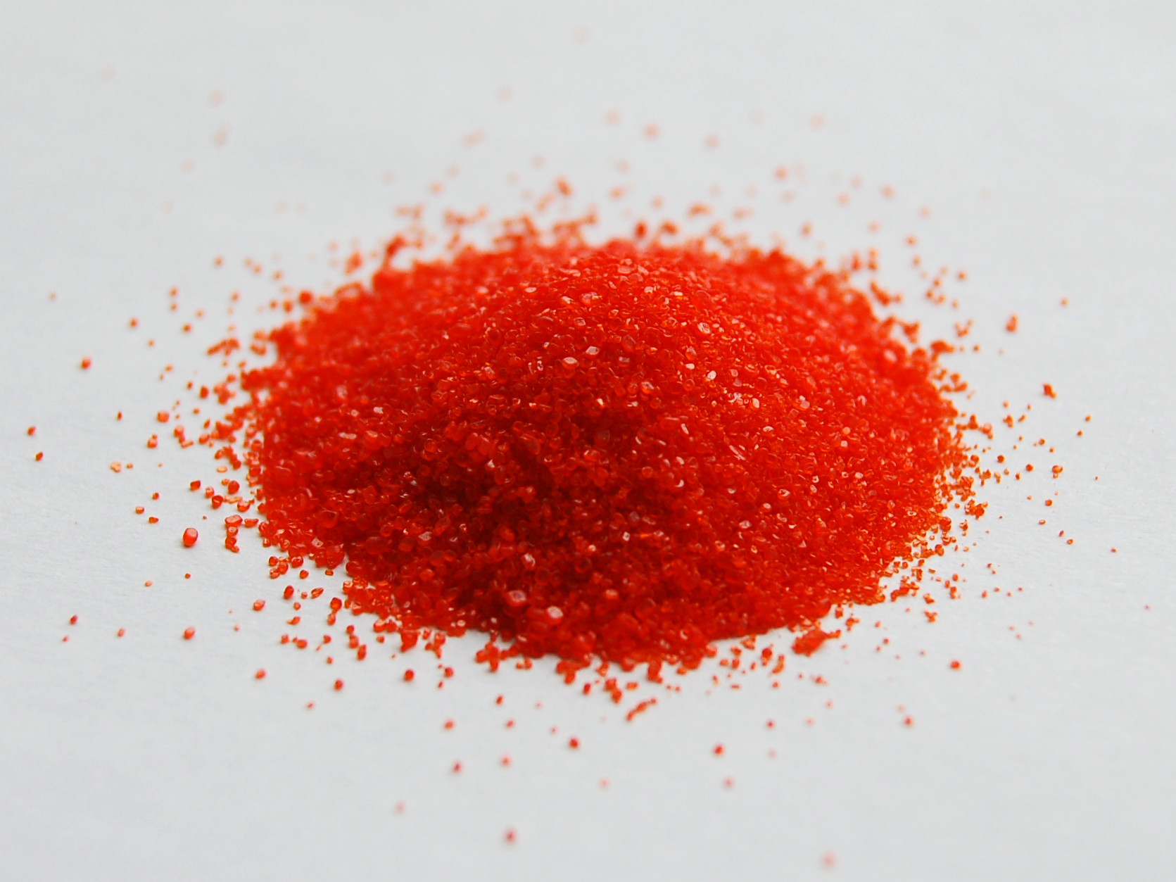 Potassium dichromate sample